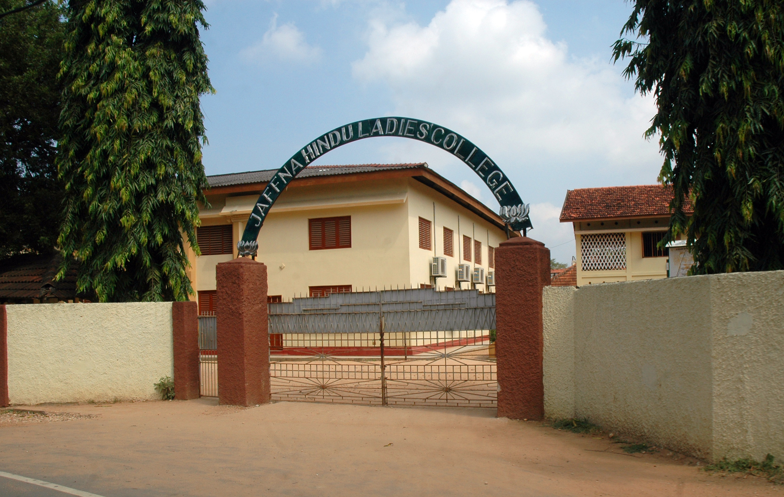 யாழ்ப்பாணம் இந்து பெண்கள் கல்லூரி